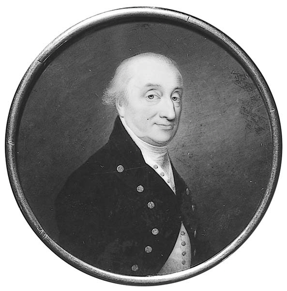 Hans Busck (1733-1822), kommerseråd, borgmästare i Göteborg. Akvarell/gouache på elfenben. Ram av metall. Mått: (diam) 6,4 cm